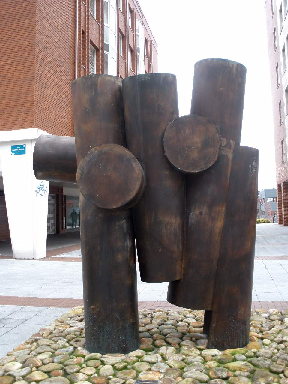 Escultura Sin título, de Remigio Mendiburu, instalada en 2009 en el Boulevard de Udondo, Leioa (Vizcaya)